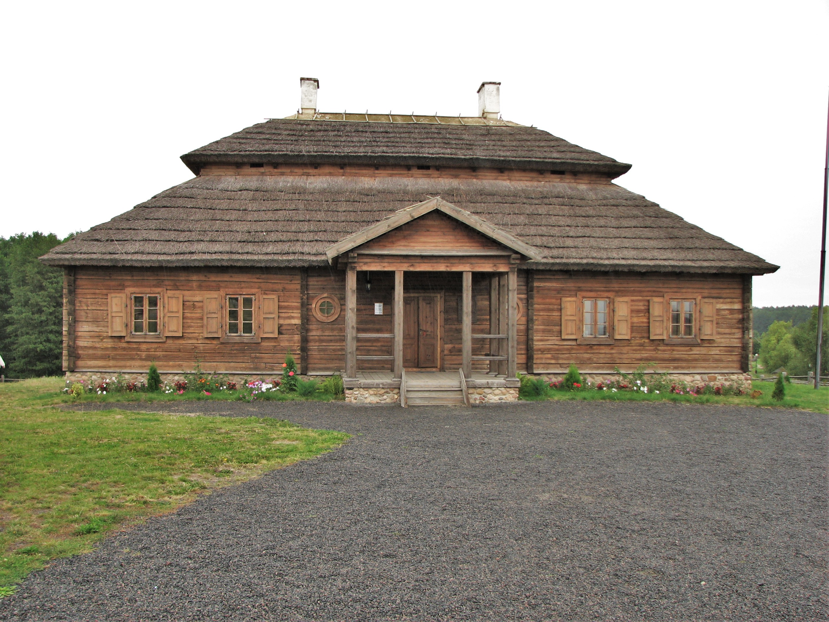 Беларуская (тарашкевіца): Косаўскі палацава-паркавы ансамбль: рэшткі былога палацу Пуслоўскіхмэмарыяльны музэй-сядзіба Т. Касьцюшкіфрагмэнты парку. г. Косава This is a photo of Belarusian heritage monument. Reference number: 111Г000305 ( WLM)